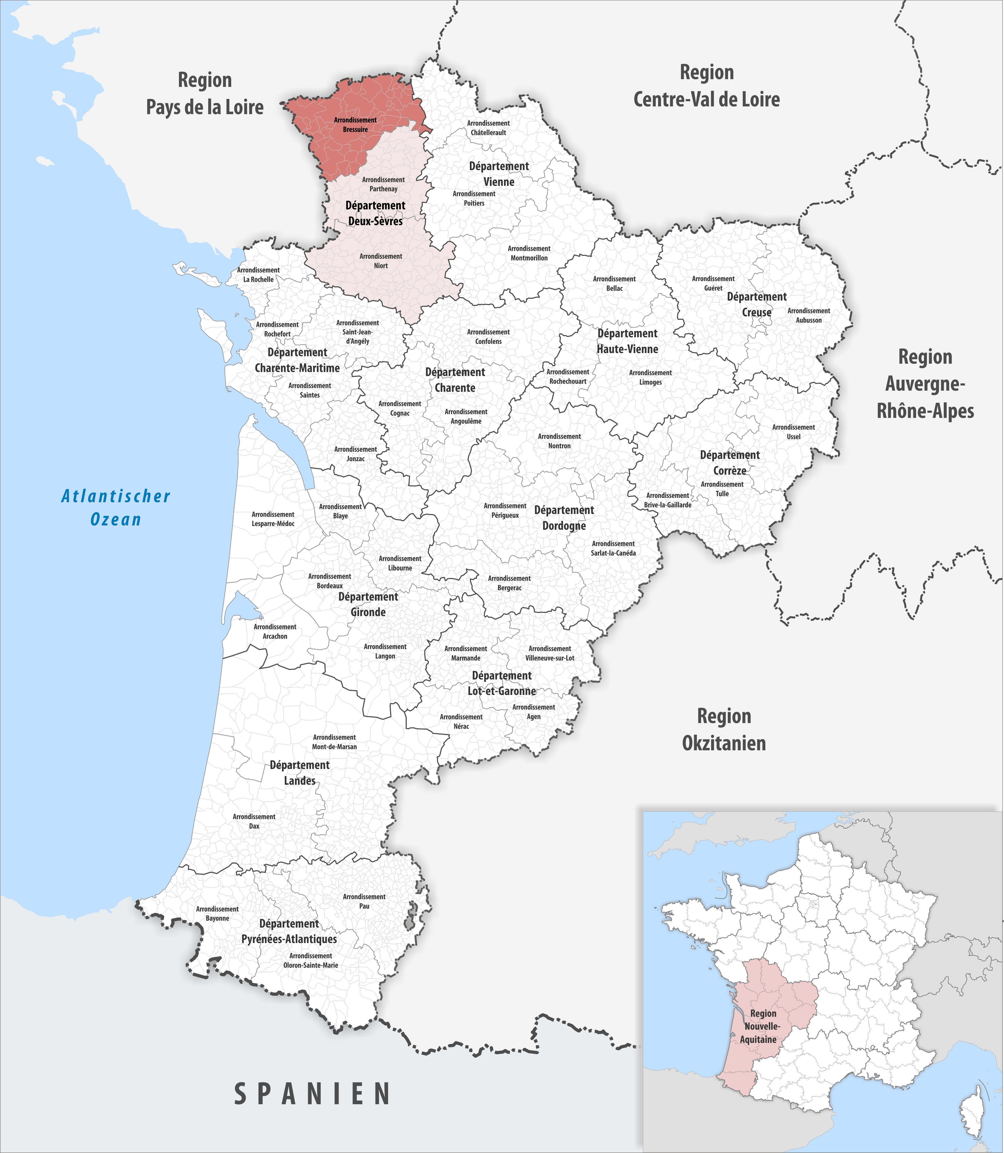 Lage des Arrondissements Bressuire